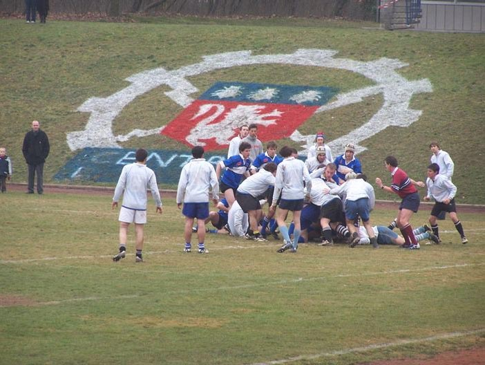 Challenge de l'École centrale de Lyon : Match Rugby Challenge 2006.